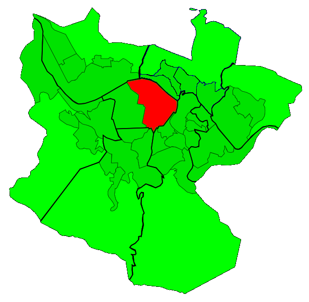 Map